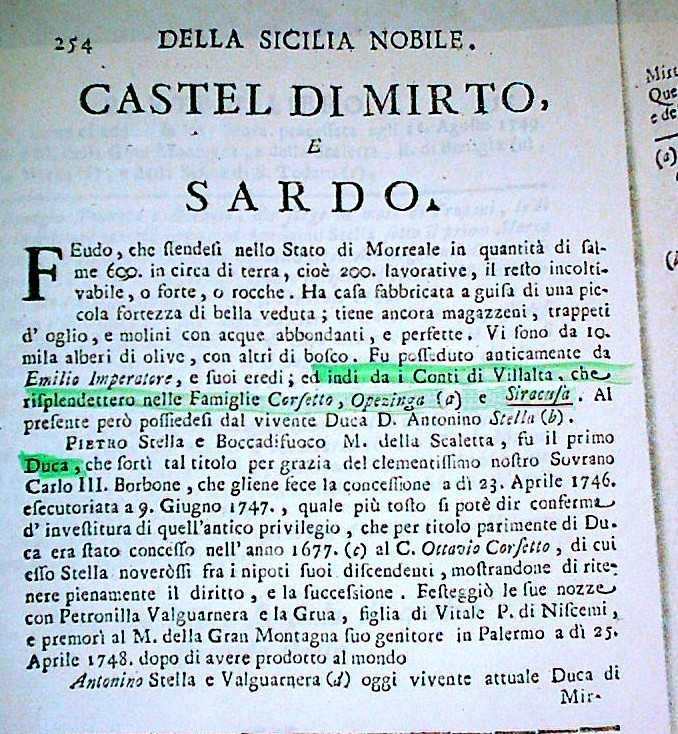 Abhandlung über Herzogtum Casteldimirto